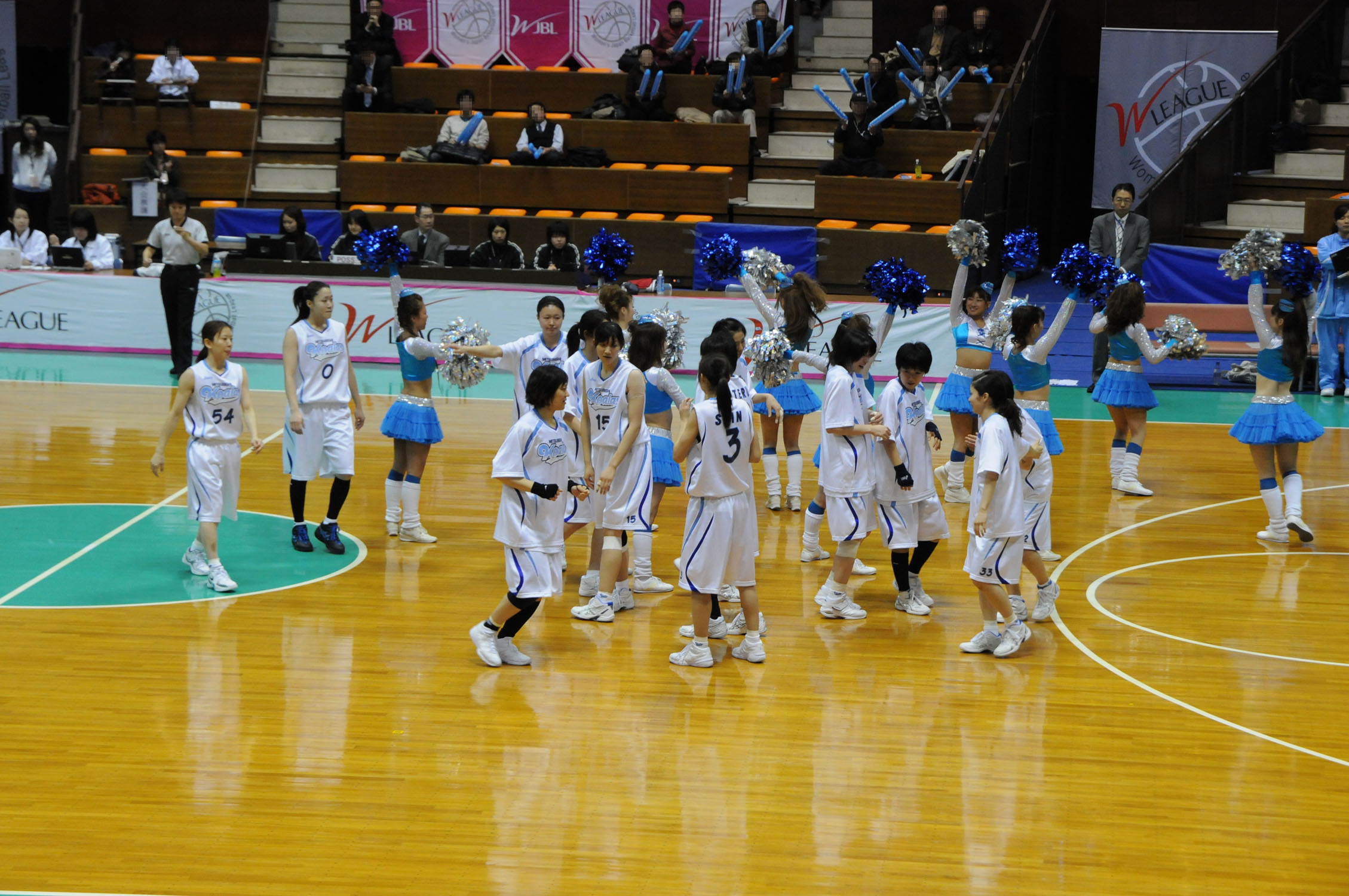 三菱電機コアラーズ、代々木第二体育館で。